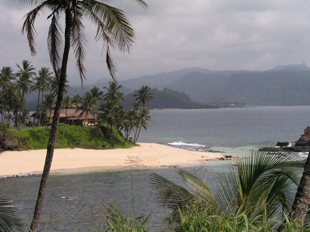 O restaurante do resort Pestana Equador, no ilhéu das Rolas, em S. Tomé.